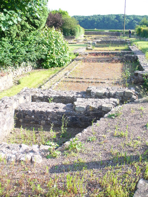 Roman Remains - Caerwent